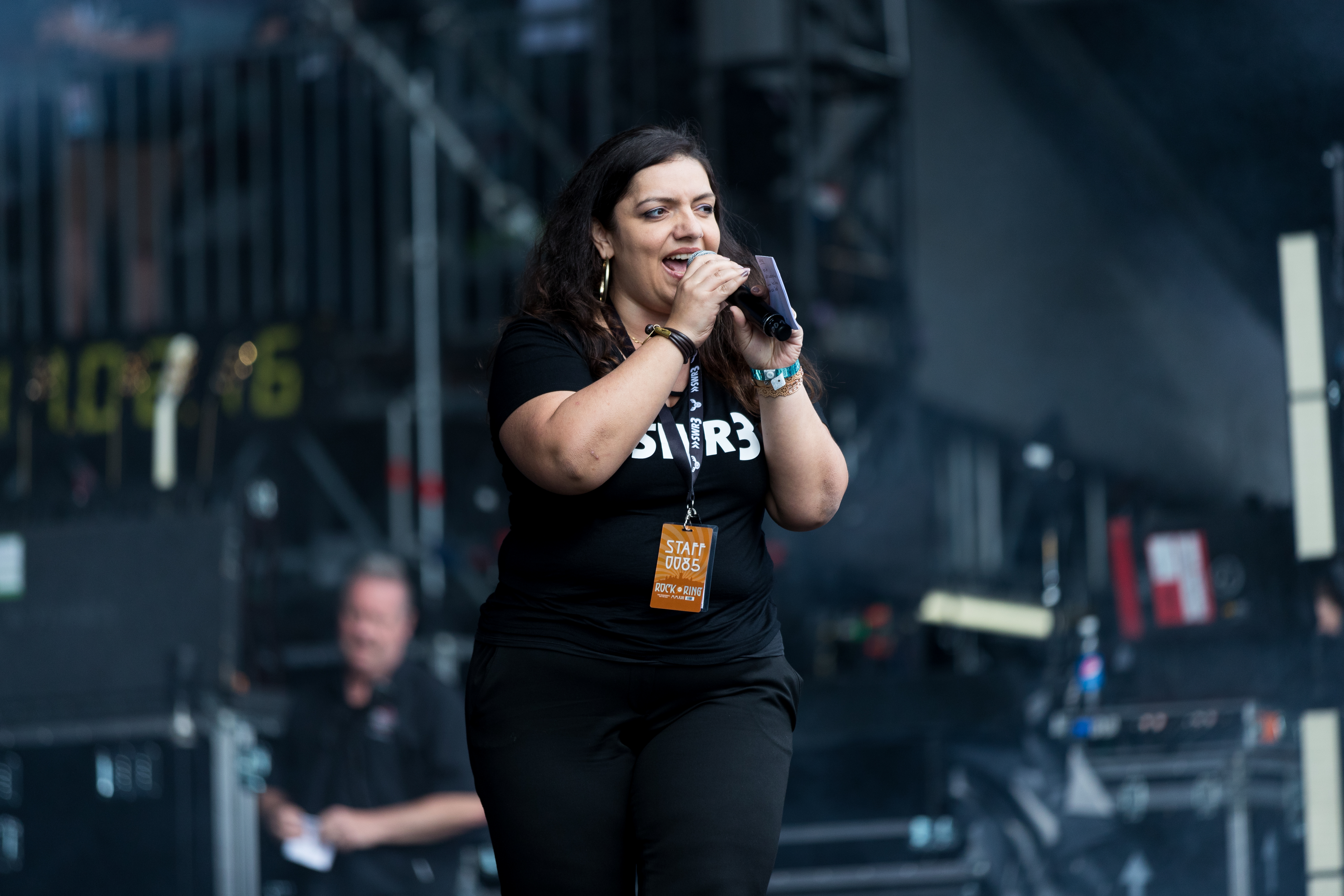 Anneta Politi during Rock am Ring at Nürburgring, Nürnburg, Rheinland Pfalz, Germany on 2017-06-02, Photo: Sven Mandel